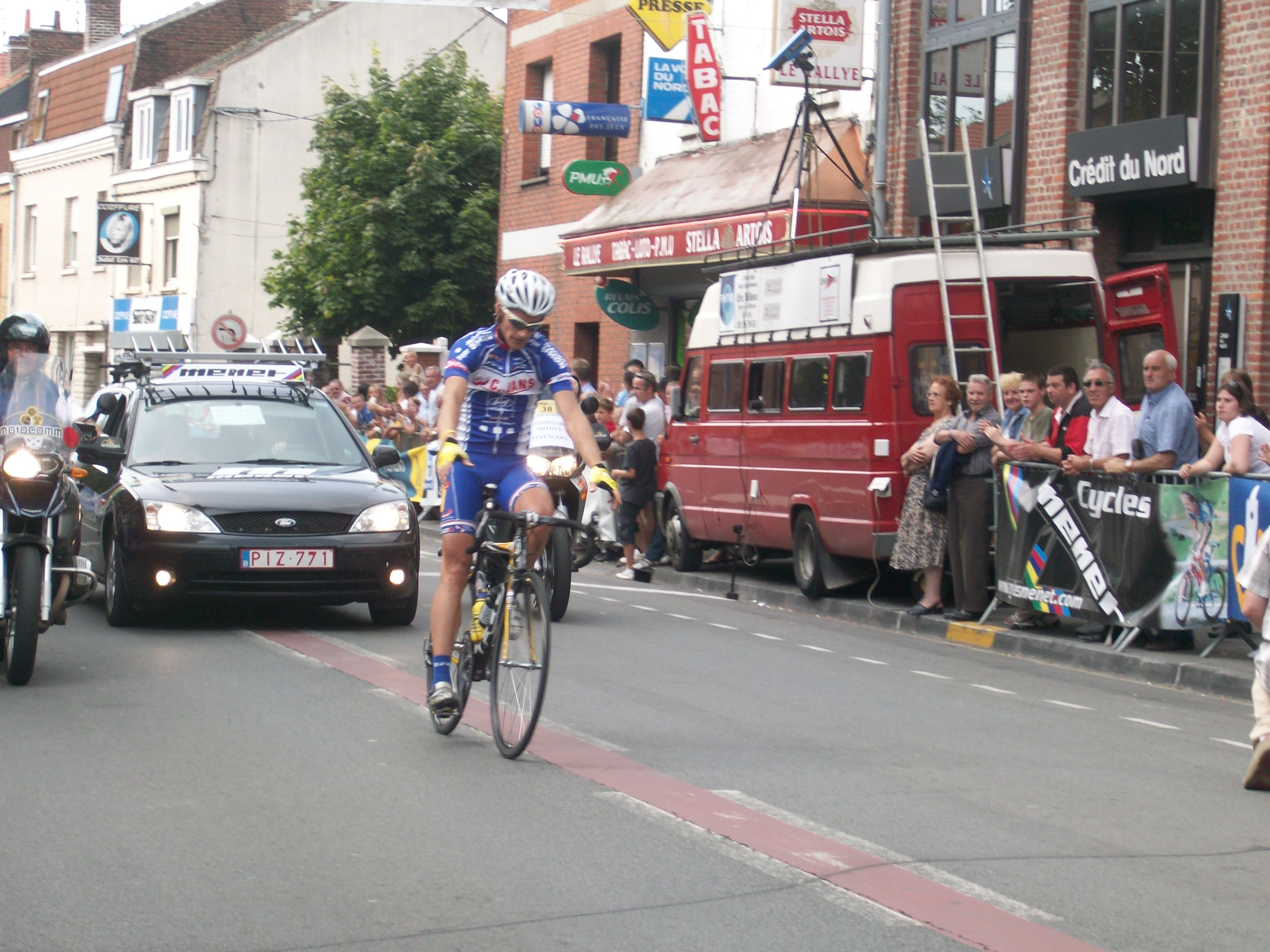 Robert Retschke, remportant le Grand Prix de Pérenchies 2009